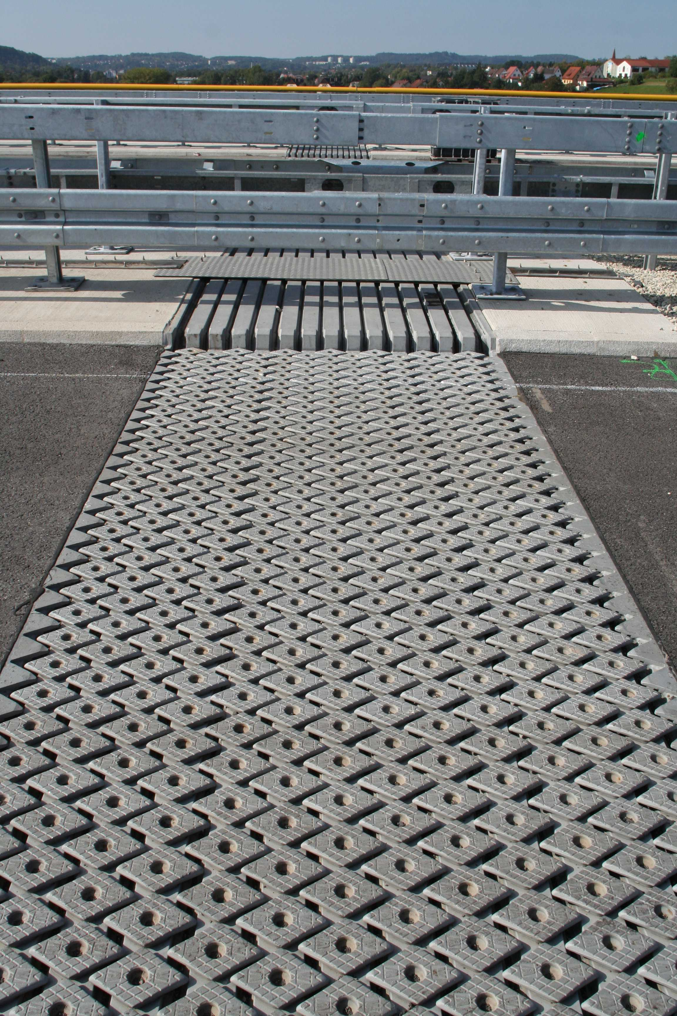 Fahrbahnübergangskonstruktion der Itztalbrücke A73 bei Coburg